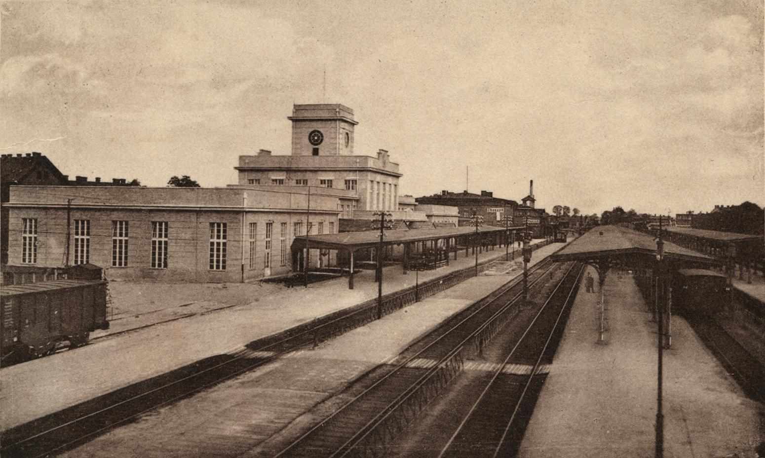 Widok na nowy budynek dworca - 1930r.